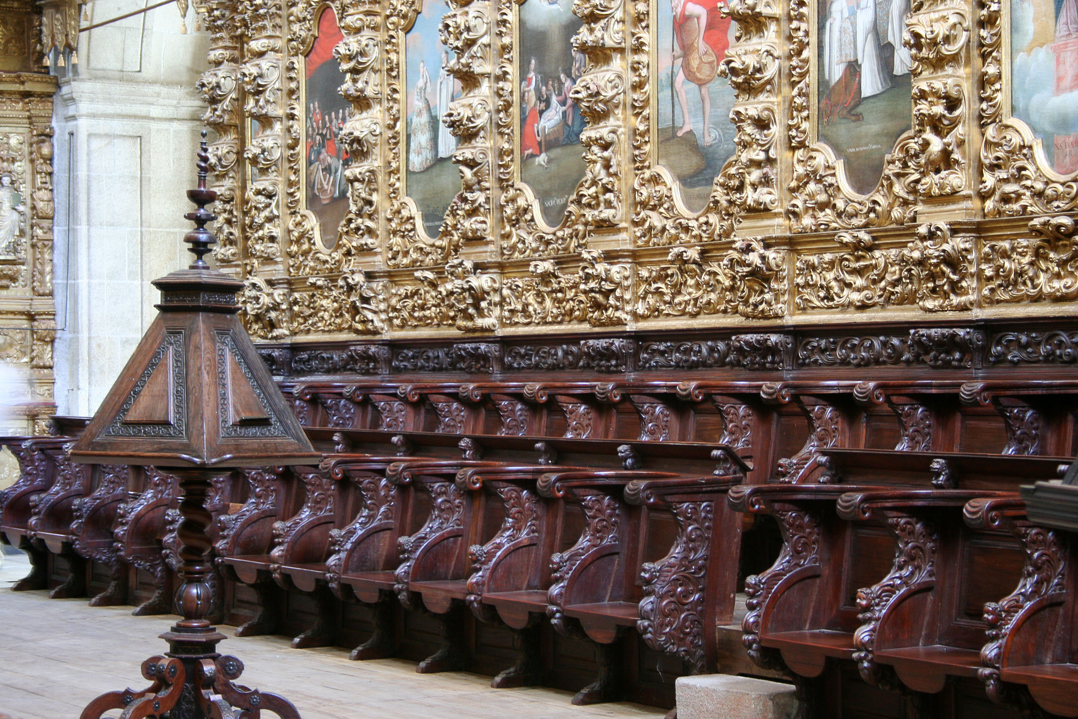 Cadeiral do Mosteiro de Arouca